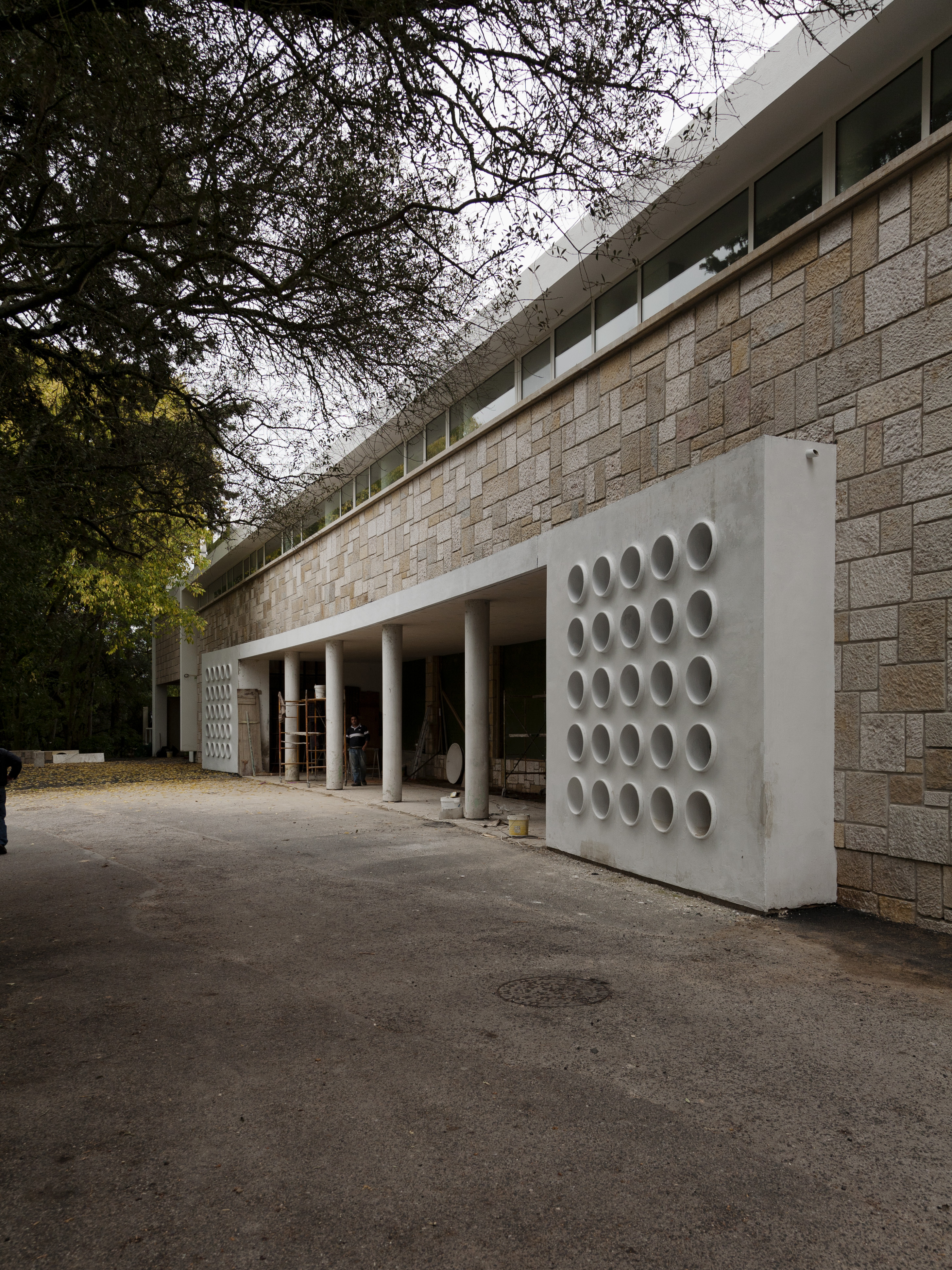 Montes Claros, parque de Monsanto, Lisboa; Arq. Keil do Amaral